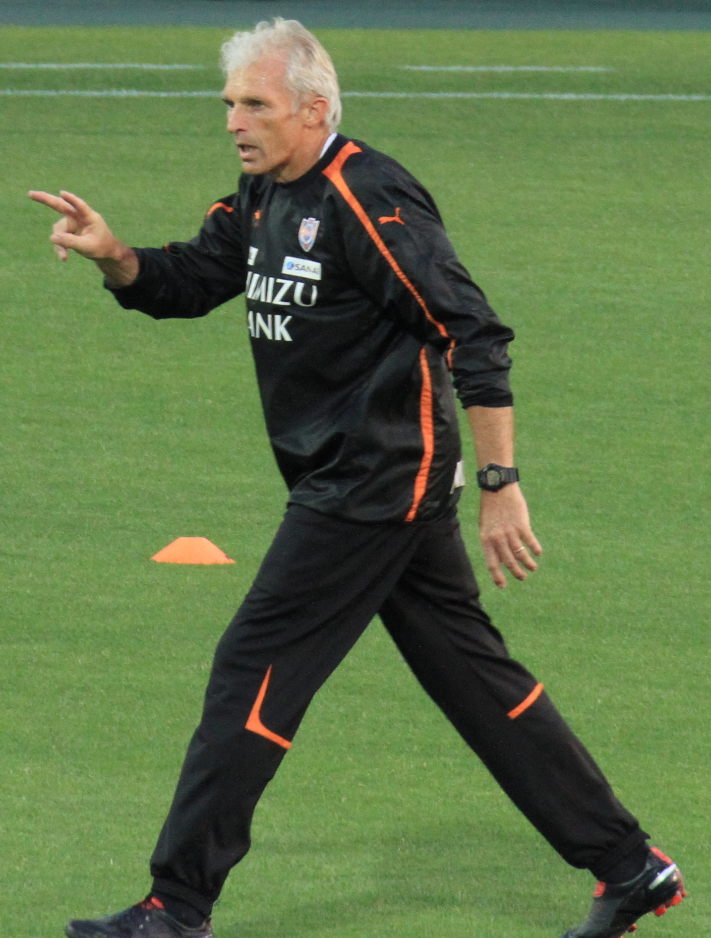 Dido Havenaar, goalkeeping coach for Shimizu S-Pulse in 2012.